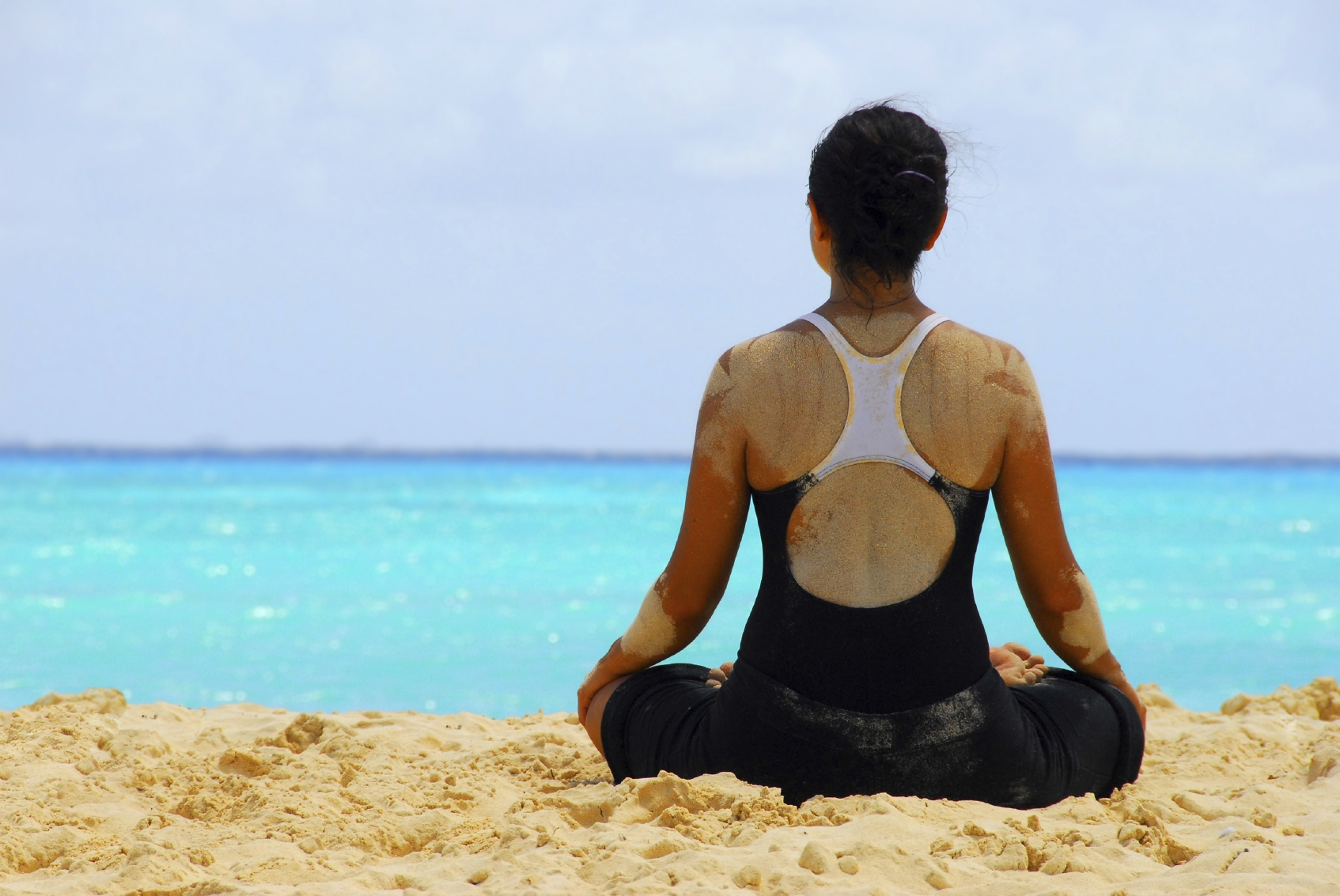 Dhyana Yogini Yogi